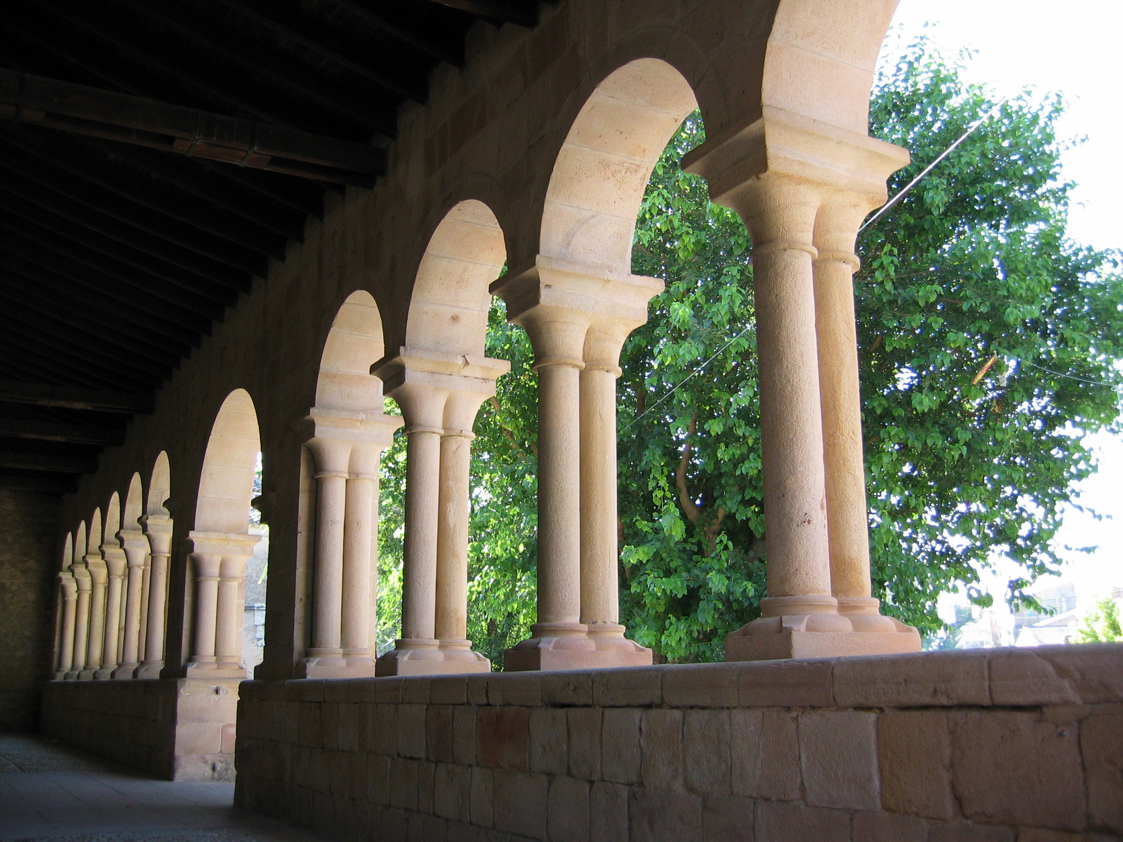 Entrada a la Iglesia